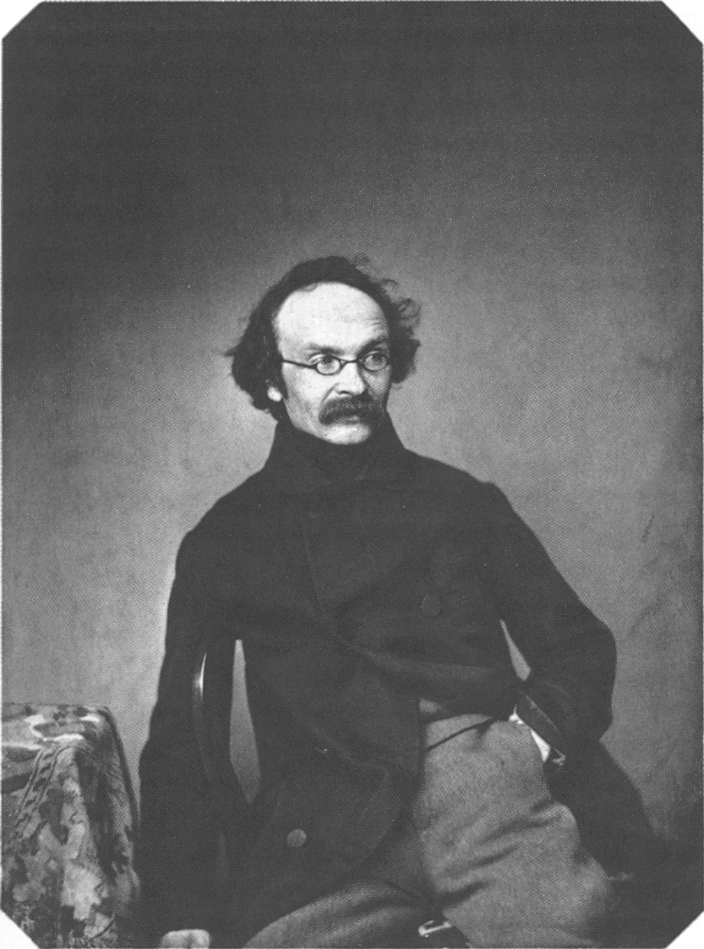 Kaspar Kaltemoser (1806-1867)